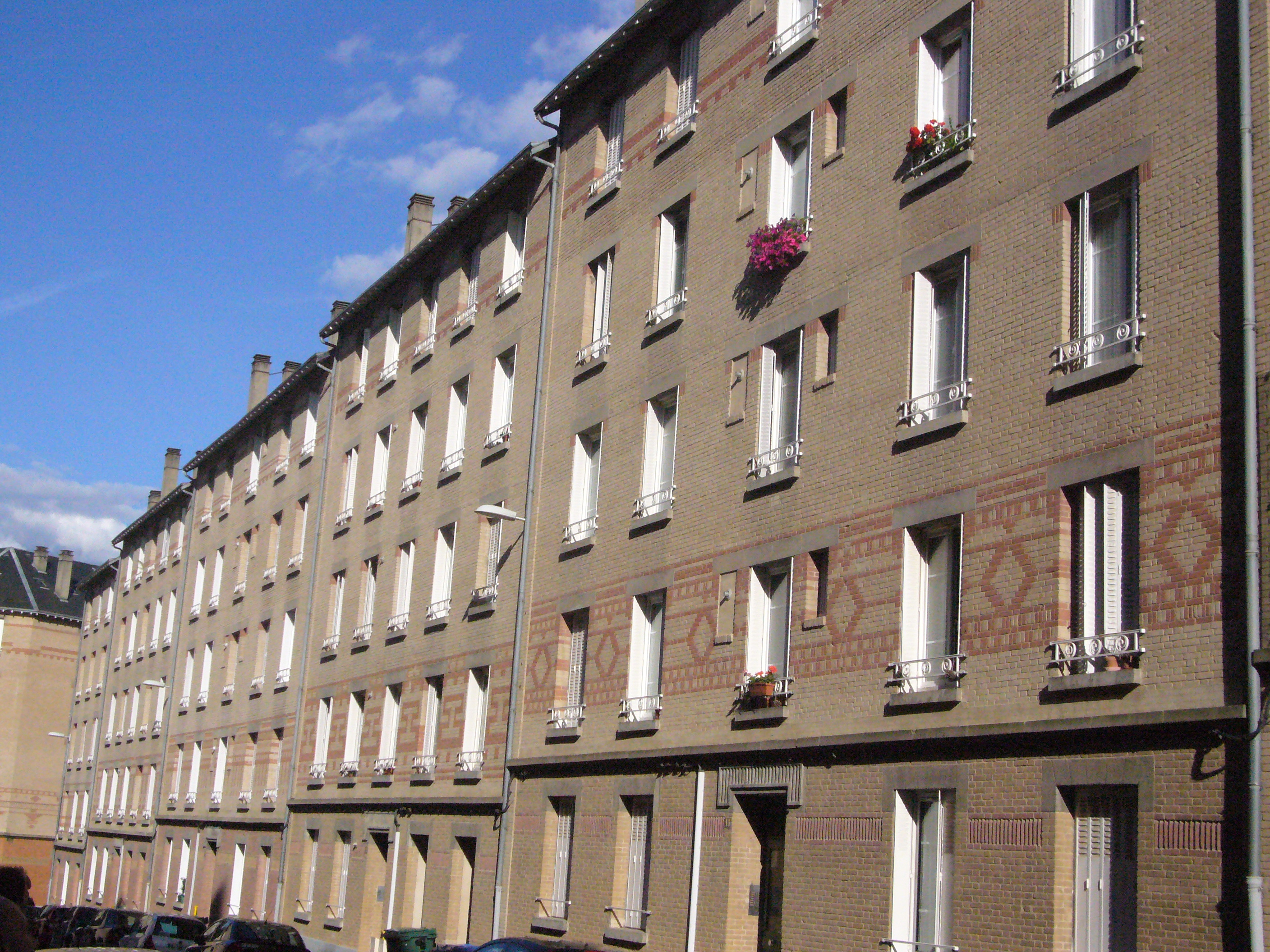 La cité ouvrière des Coutures, à Limoges (Haute-Vienne)